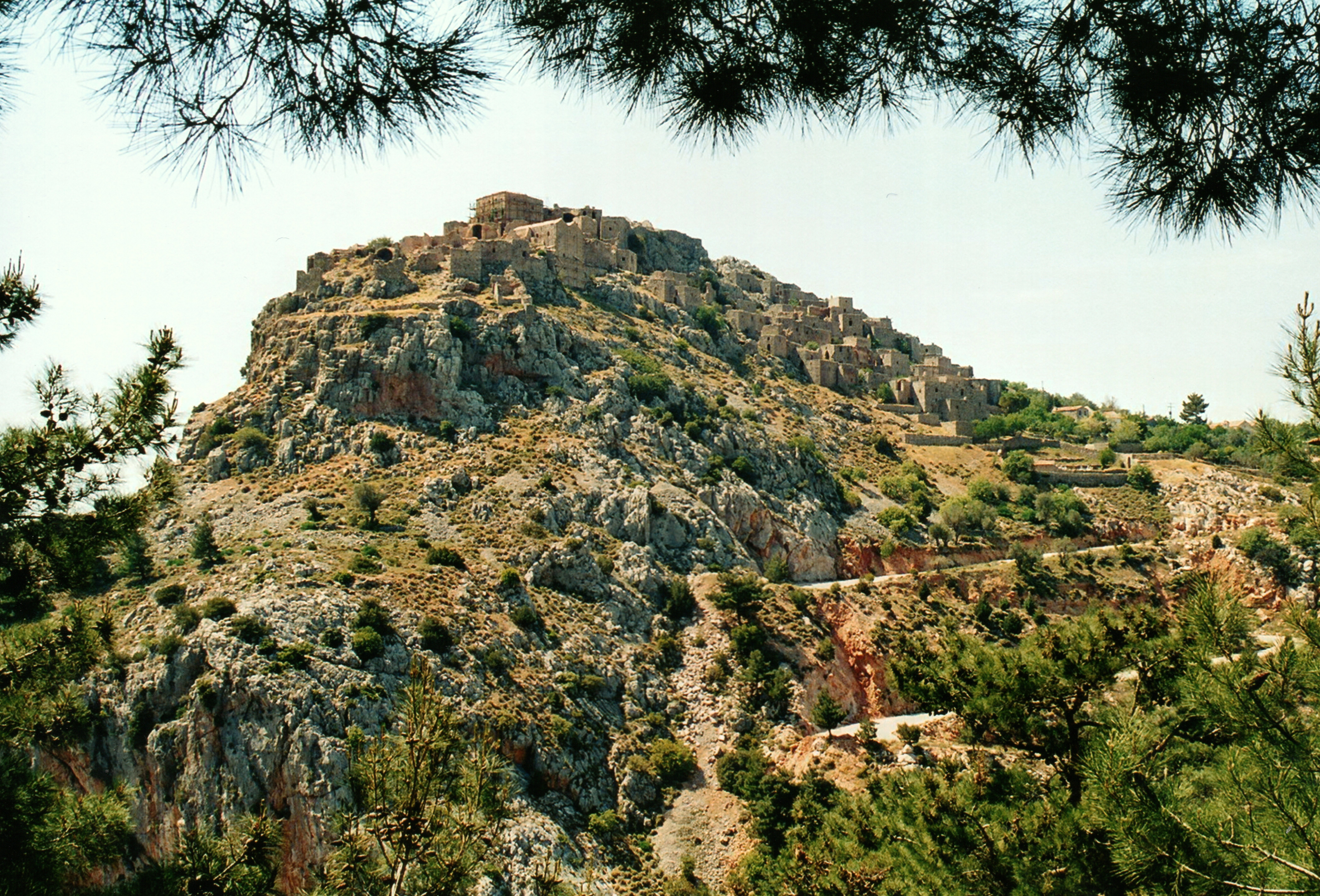 Gios, Anavatos. De bewenners lieten harren yn 1822 massaal fan de likernôch 300 meter hege rots falle om tefoarren te kommen dat hja yn de hannen fan de Turken foelen.